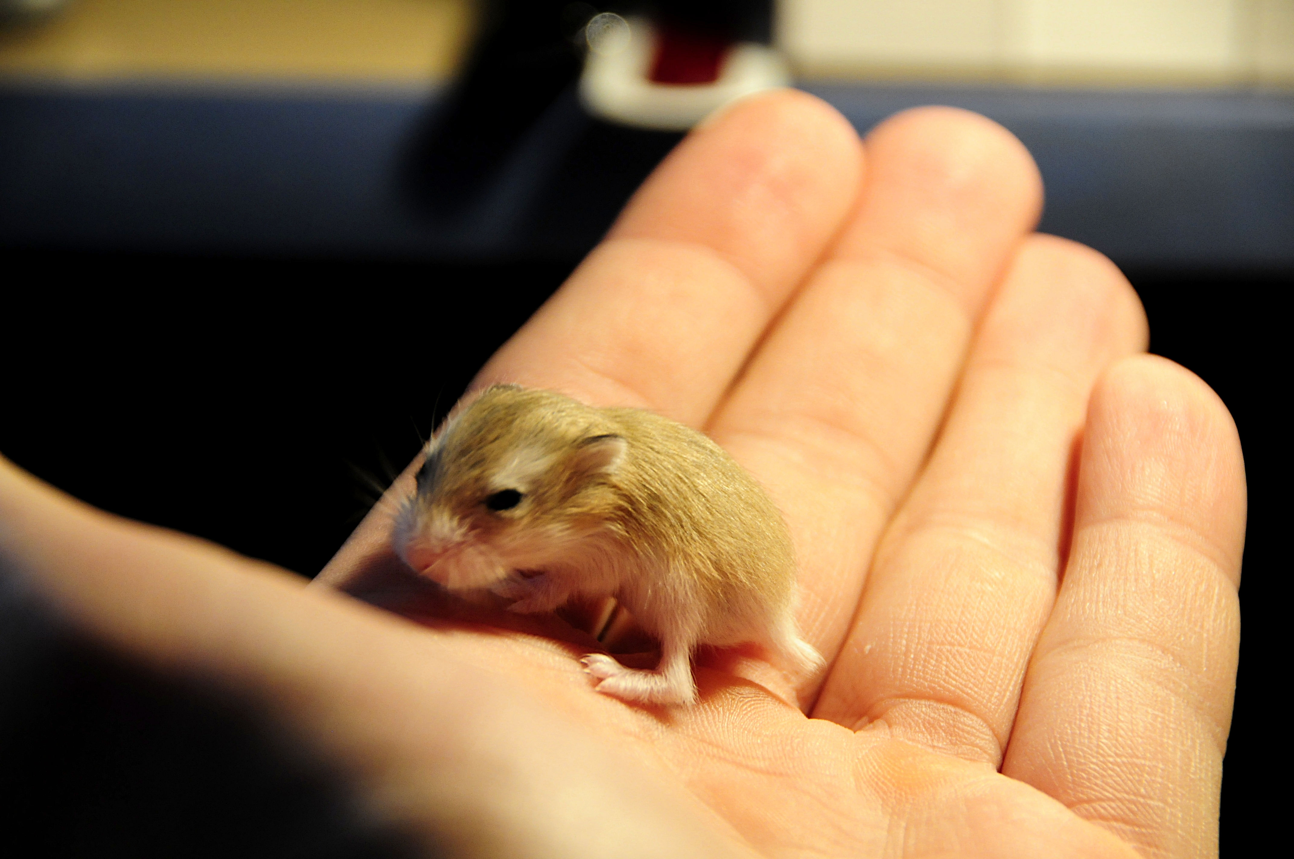 Baby hamster Roborovski.